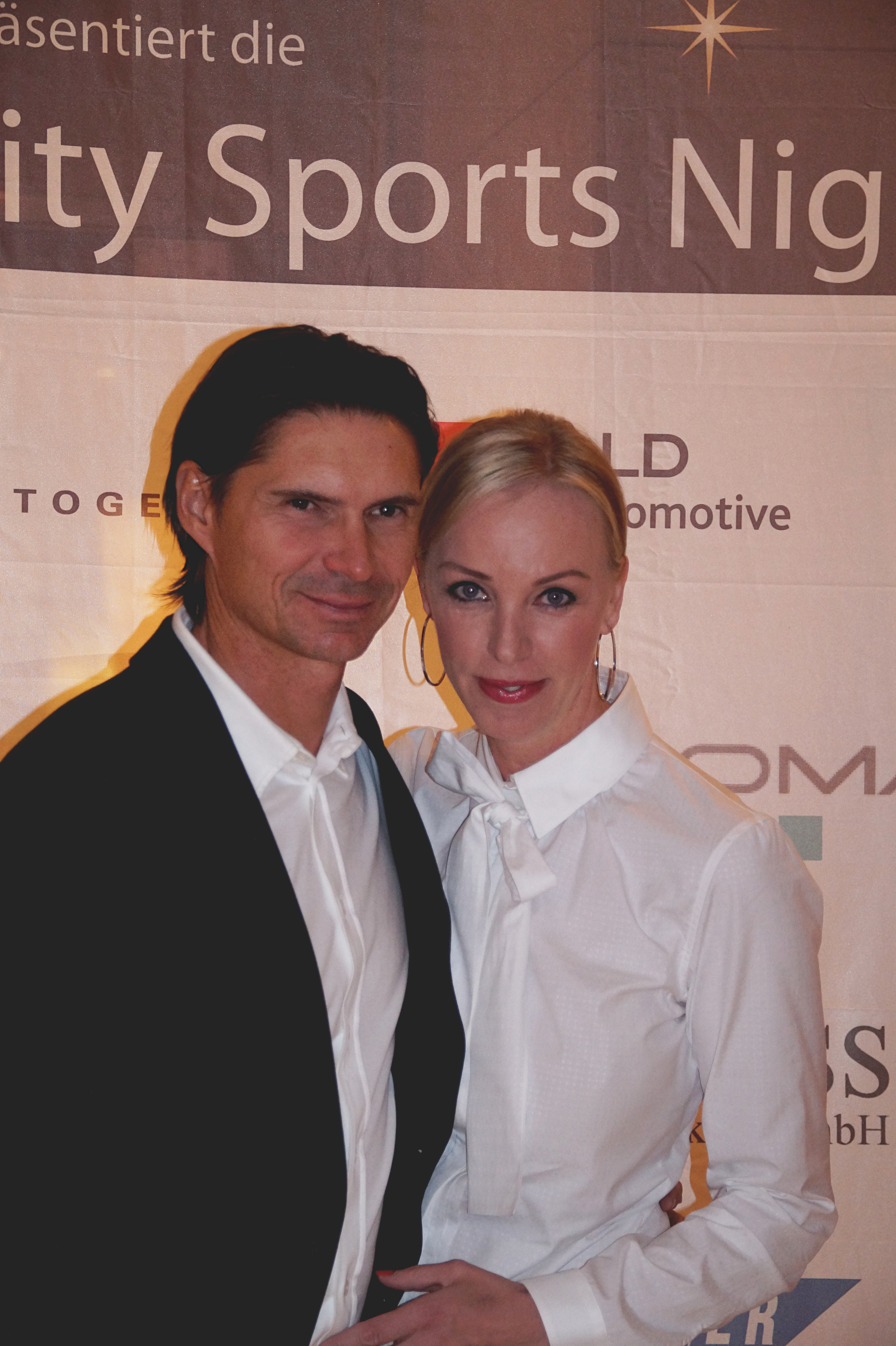 Thomas Brdarić mit Gattin Antje bei der "Kölner Charity Sports Night", am 27.11.2016 im Kölner Dorint Hotel.